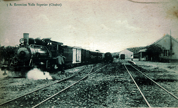 La Baldwin 2-8-2/4-4 N°9 espera su salida en cargo de un tren descendiente en Dolavon o el Valle Superior .